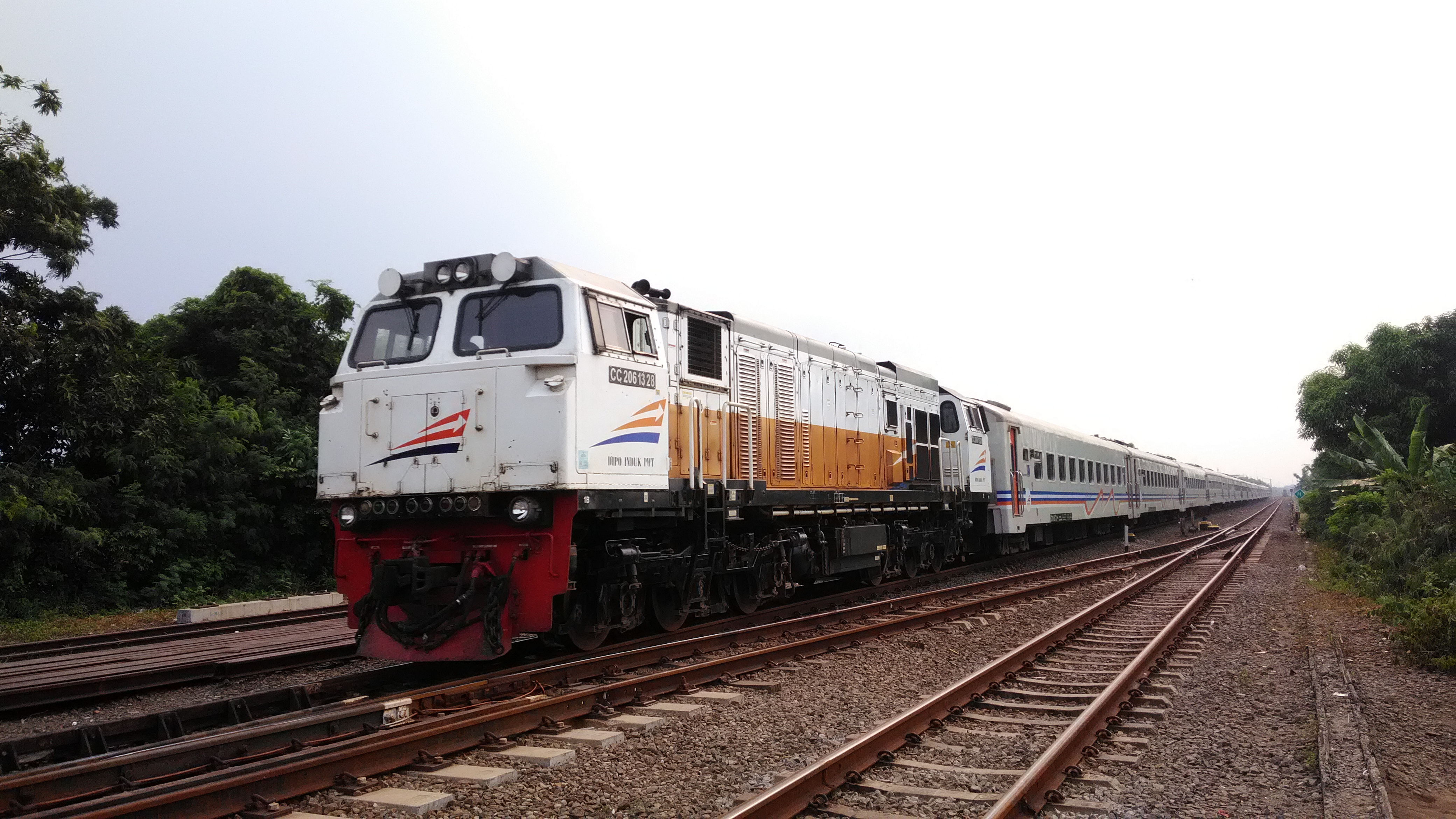 KA Kertajaya Rangkaian Panjang Sebelum Berganti Rangkaian Stainless Steel Sunda: KA Kertajaya Rangkéan Panjang Sateuacan diganti ku Rangkéan Stainless Steel